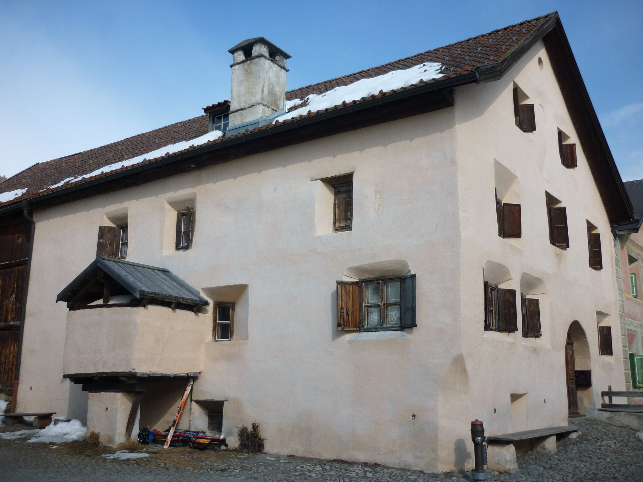 Backofen, Guarda GR, Schweiz